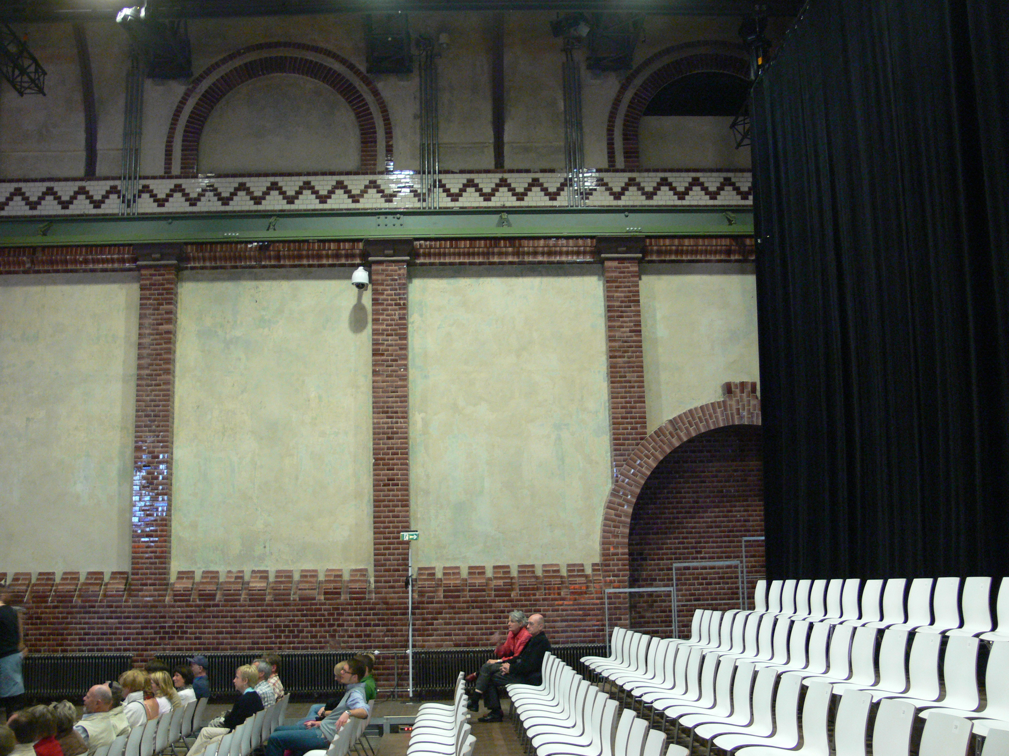 Radialsystem V, Berlin-Friedrichshain Halle